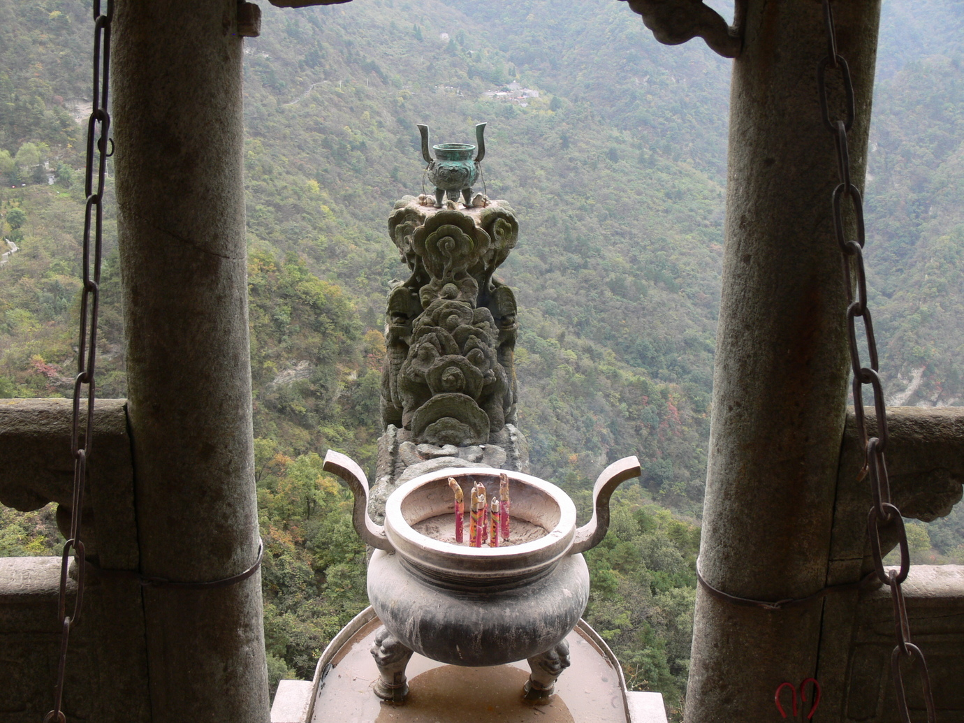 中文（中国大陆）: 武当山南岩宫龙头香